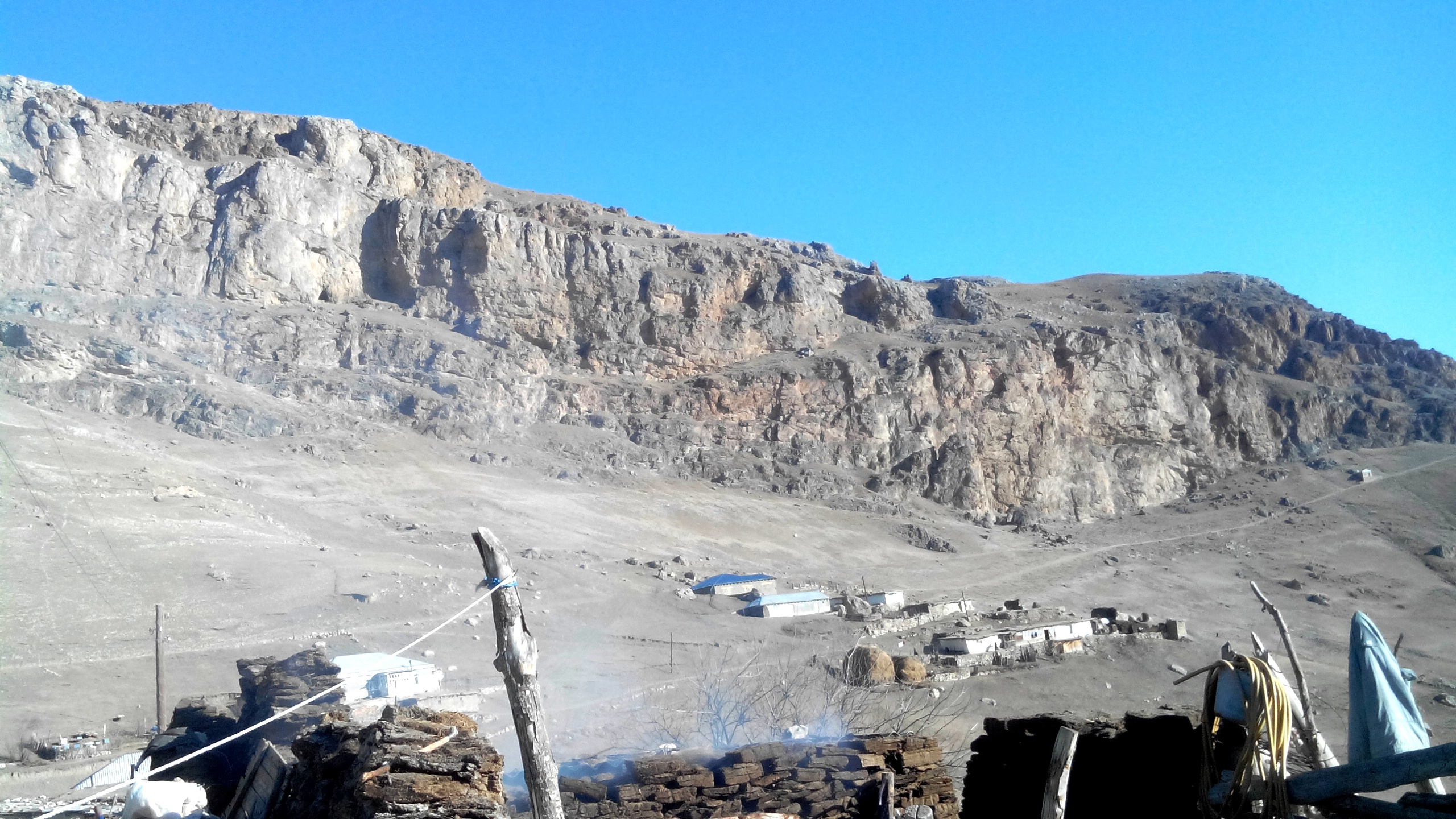 Qalayxudat